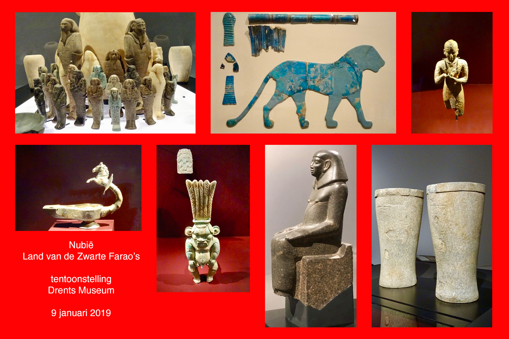 met de klok mee links boven beginnend 1) Shabtis van koning Taharqa en koning Senkamanisken 2) Leeuw 3) beeldje van Taharqa 4) offerstandaarden van koning Anlamani 5) functionaris 6) beeldje van Bes en 7) paard